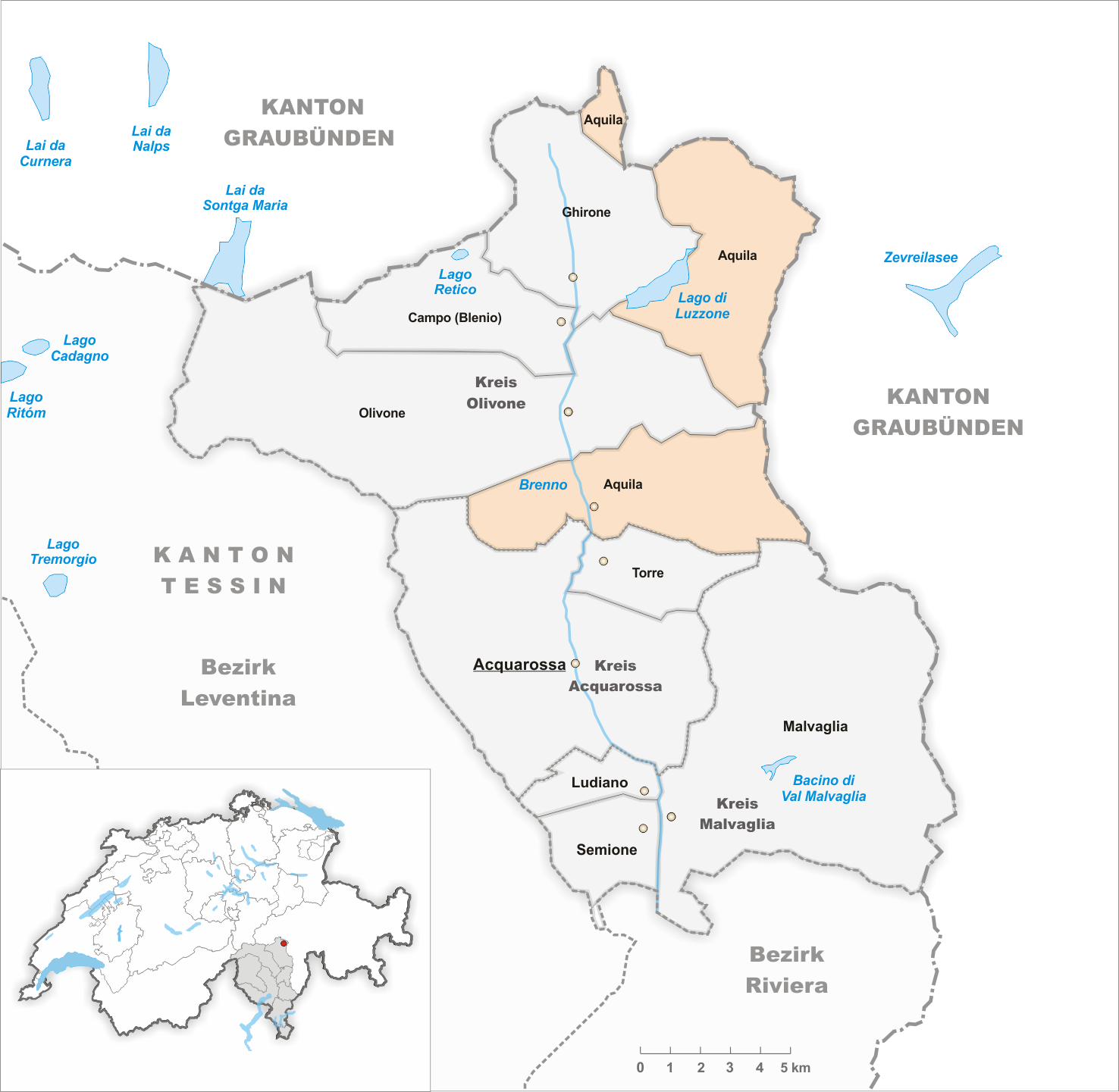 Municipality Aquila